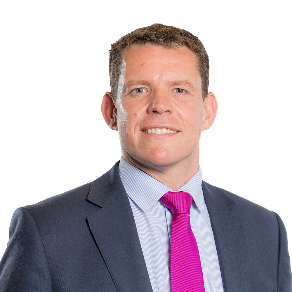 Plaid: Plaid Cymru Etholaeth: Ynys Môn Party: Plaid Cymru Constituency: Ynys Môn